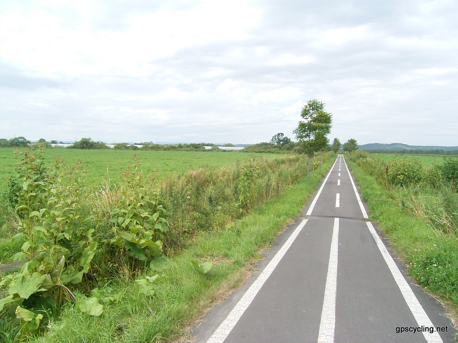 北海道道835号釧路阿寒自転車道線。panoramioより転載。